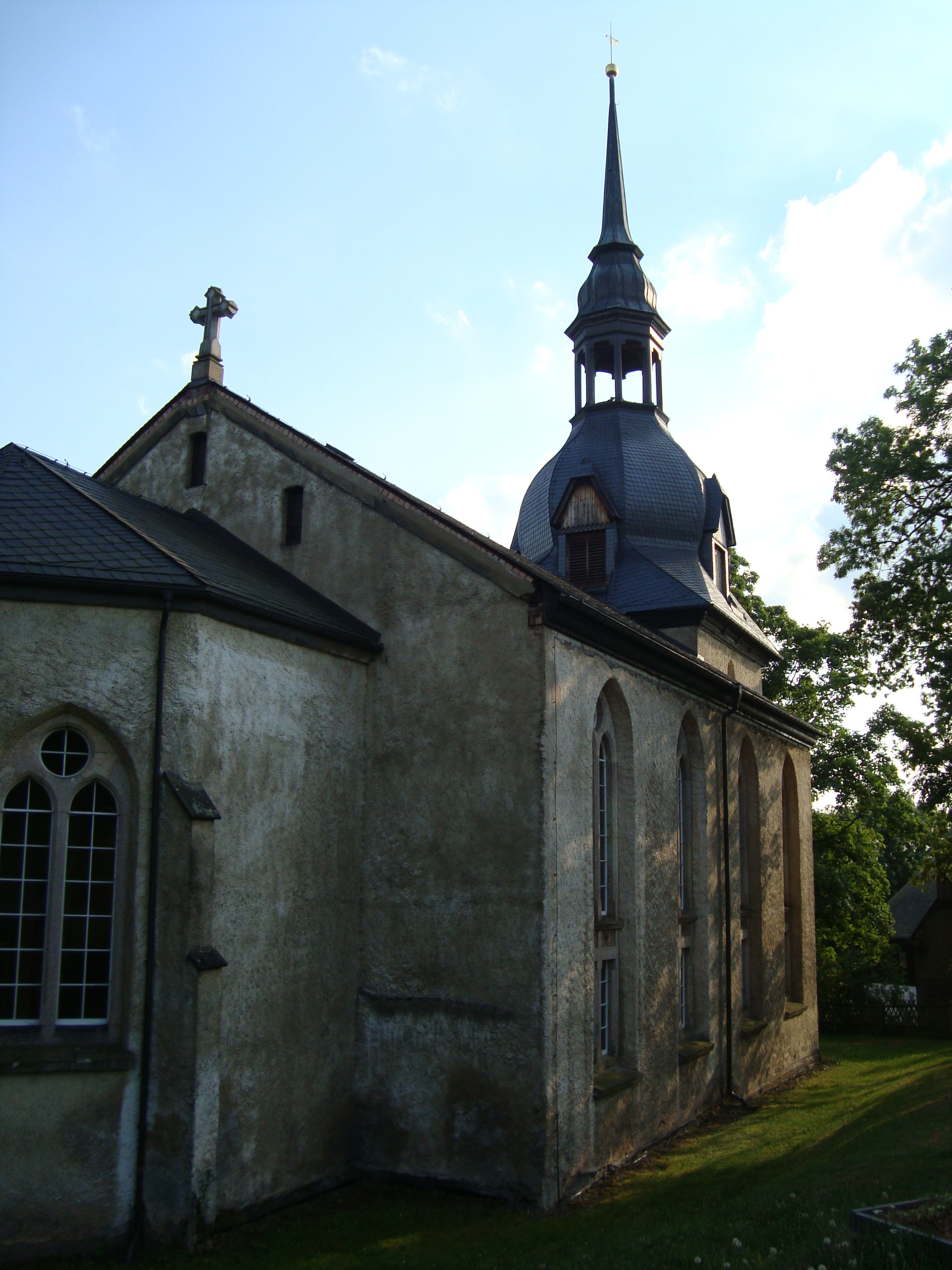 Kirche in Erlbach-Kirchberg OT Erlbach im Erzgebirge